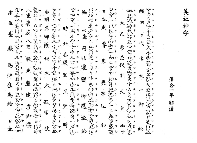 美しの杜神字録 解読書 １